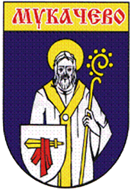 Герб міста мукачева. ПАСПОРТ міста Мукачева 2009 рік.